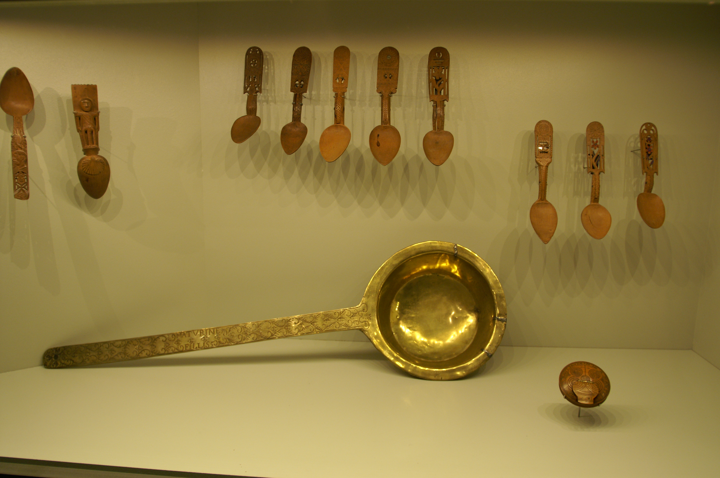 Cuillères de mariage et louche à amidon. Exposition « Les bretons et l'argent » au Musée de Bretagne. Musée de Bretagne Native nameMusée de BretagneLocationRennes, FranceCoordinates48° 06′ 18″ N, 1° 40′ 30″ W Established1960Websitemusee-bretagne.frAuthority control : Q3329701 Museofile: M0212